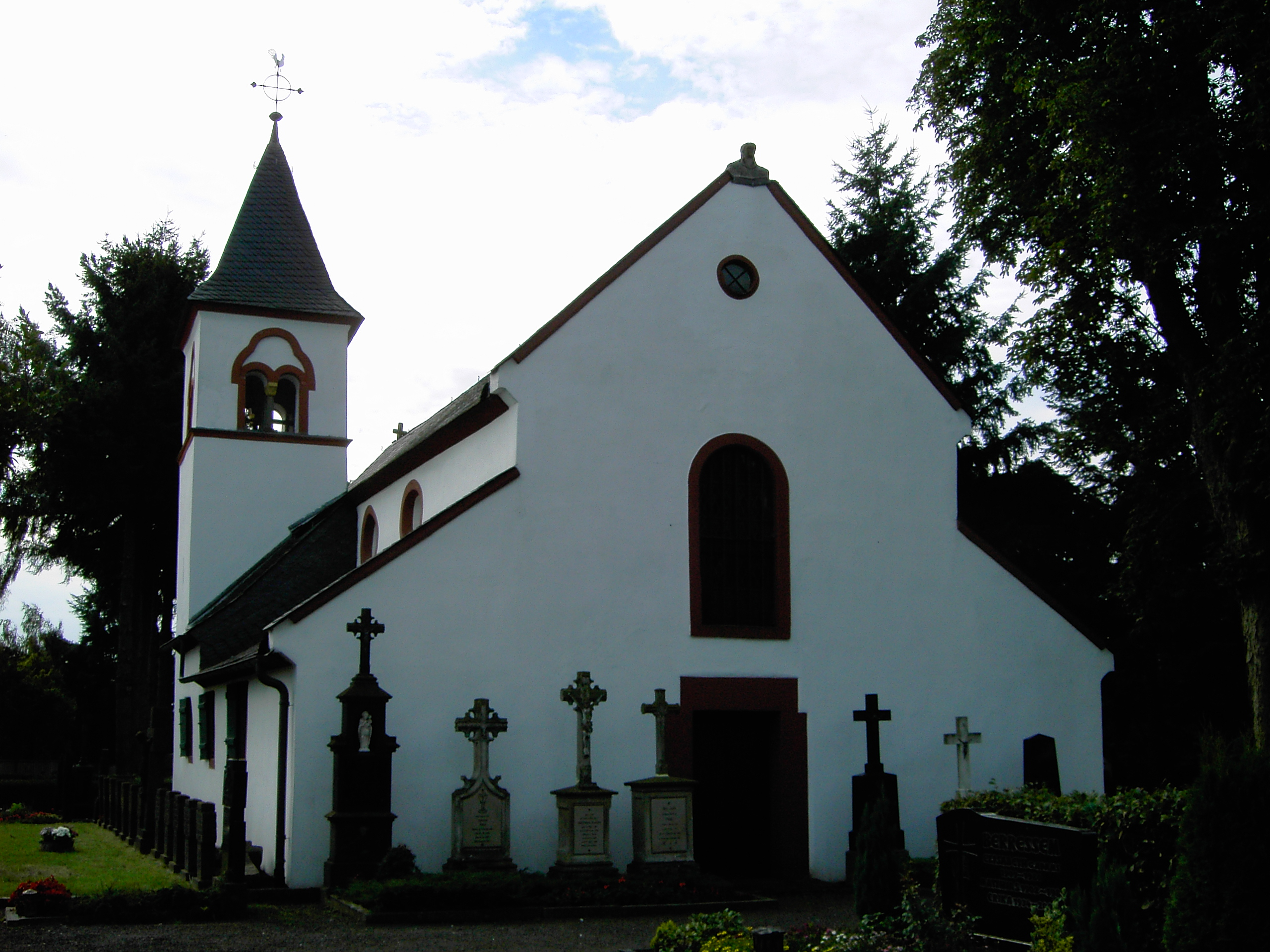 Kapelle Sankt Georg Polch